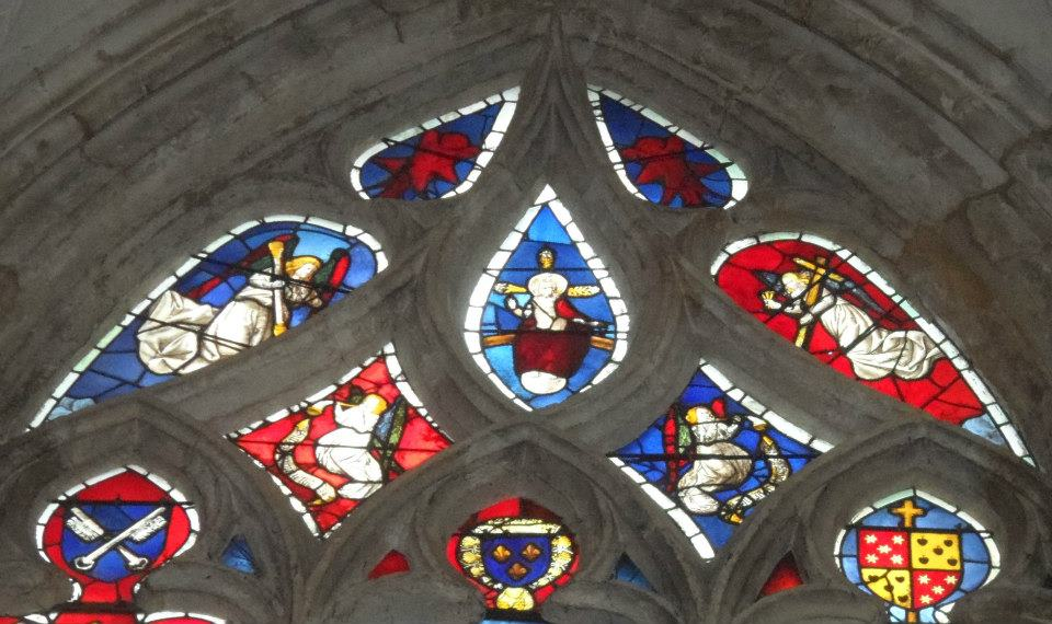 Une partie d'un vitrail comportant en bas le blason du chapitre, celui de Tristan de Salazar et celui du royaume de France.